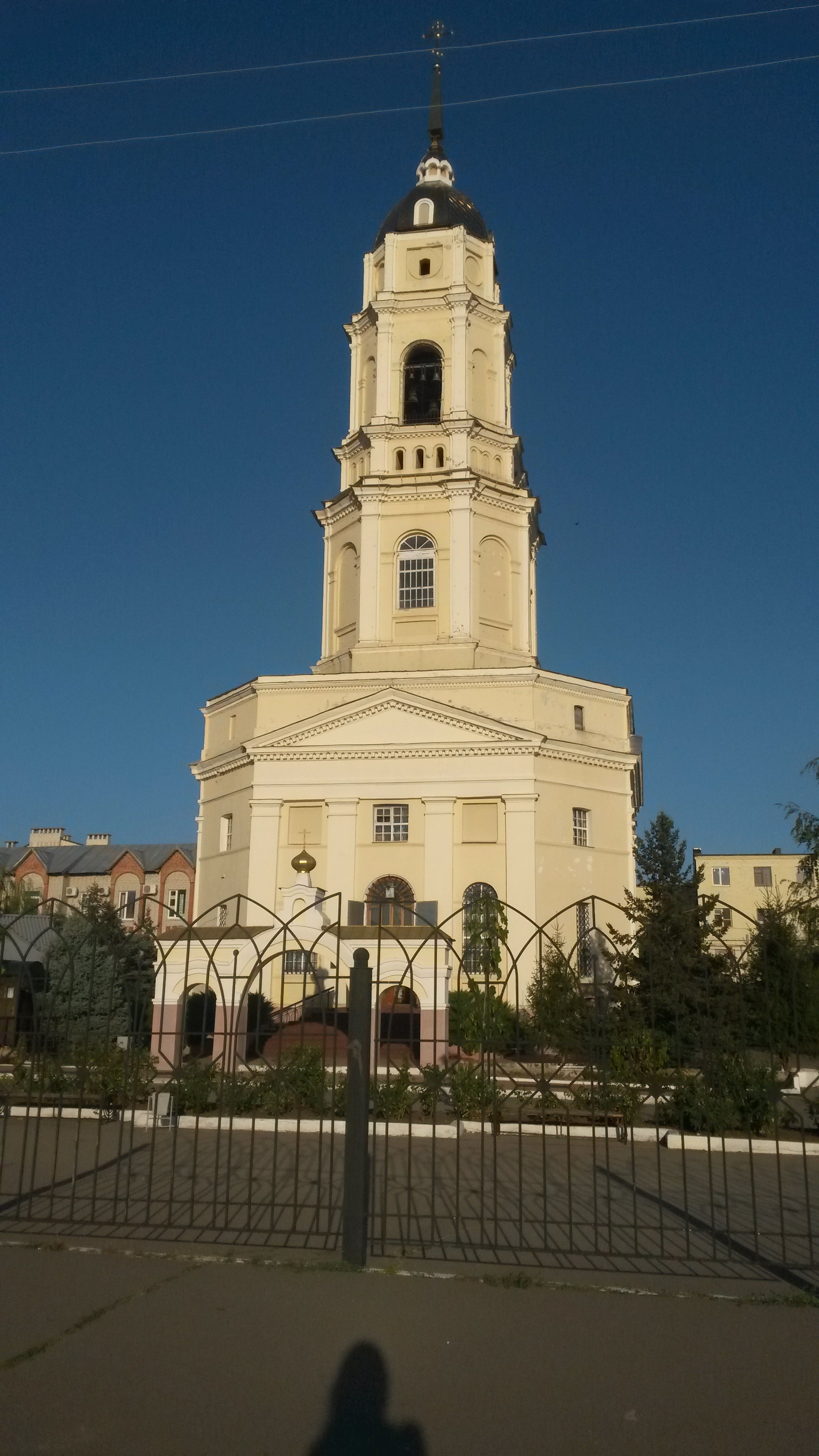 Россошь, Россошанский район, Воронежская область